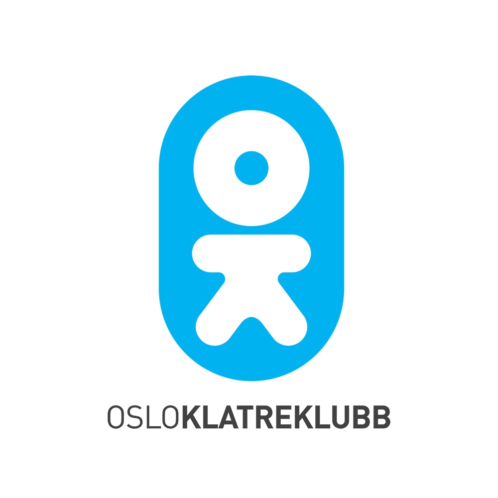 Emblemet til Oslo klatreklubb.